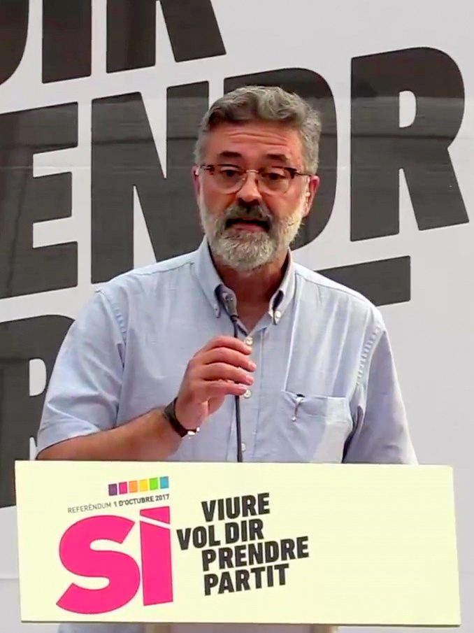 Carles Riera Diputat de la CUP a la comissió d'Ensenyament.La CUP ha exposat com a tret fonamental que, en el compte enrere per a l'1-O, no hi ha espai per als indecisos qui no vulguin arribar fins a les últimes conseqüències al referèndum que facin un pas al costat. i que cal 'prendre partit' en la celebració del referèndum amb un 'sí' que faci possible la transformació social del país i la consecució de la República Catalana. Aquesta és la proclama que ha llençat la CUP en un acte a la plaça de Barcelona, des d’eon ha arrencat la seva campanya nacional per mobilitzar la població. Ha llençat un missatge a l'alcaldessa Mercè Conesa i al PDeCAT en el camí per a l’assoliment de la independència. Es tracta d’una gira per 40 ciutats, aquest mes de juliol, en què s’abordaran els avantatges que aportaria la independència en 8 eixos. 1er Eix, Educació. A la Plaça Barcelona Laura Alegre, Núria Gibert i Carles Riera ens parlen sobre educació per lo que cal #prenpartit per l’educació pública i de qualitat..